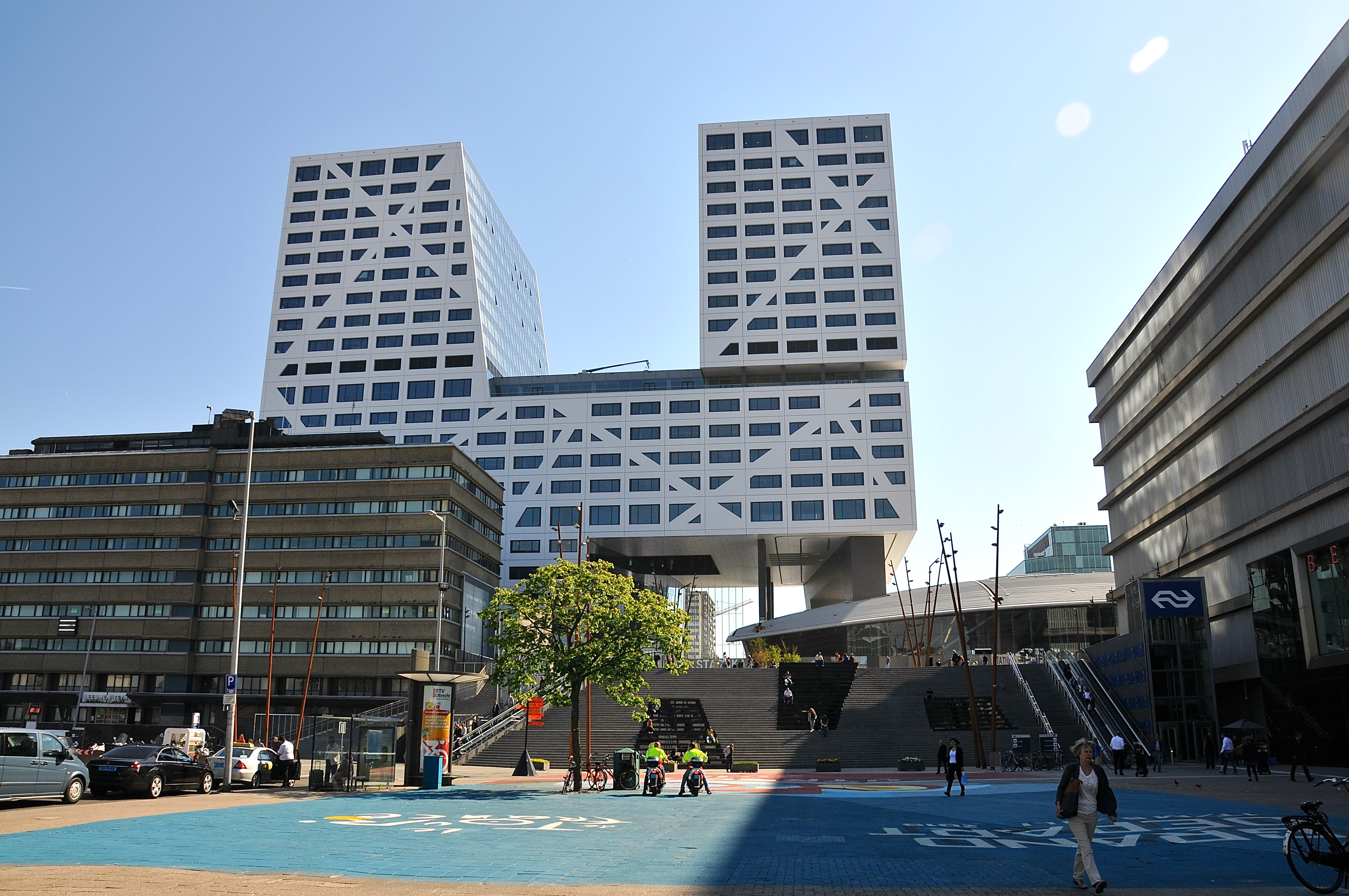 Geopend in oktober 2014. Het ligt aan het Stadsplateau, d.w.z. aan de kant van het Jaarbeursplein bij het Centraal Station. Het gebouw is 92m hoog en heeft 21 verdiepingen.